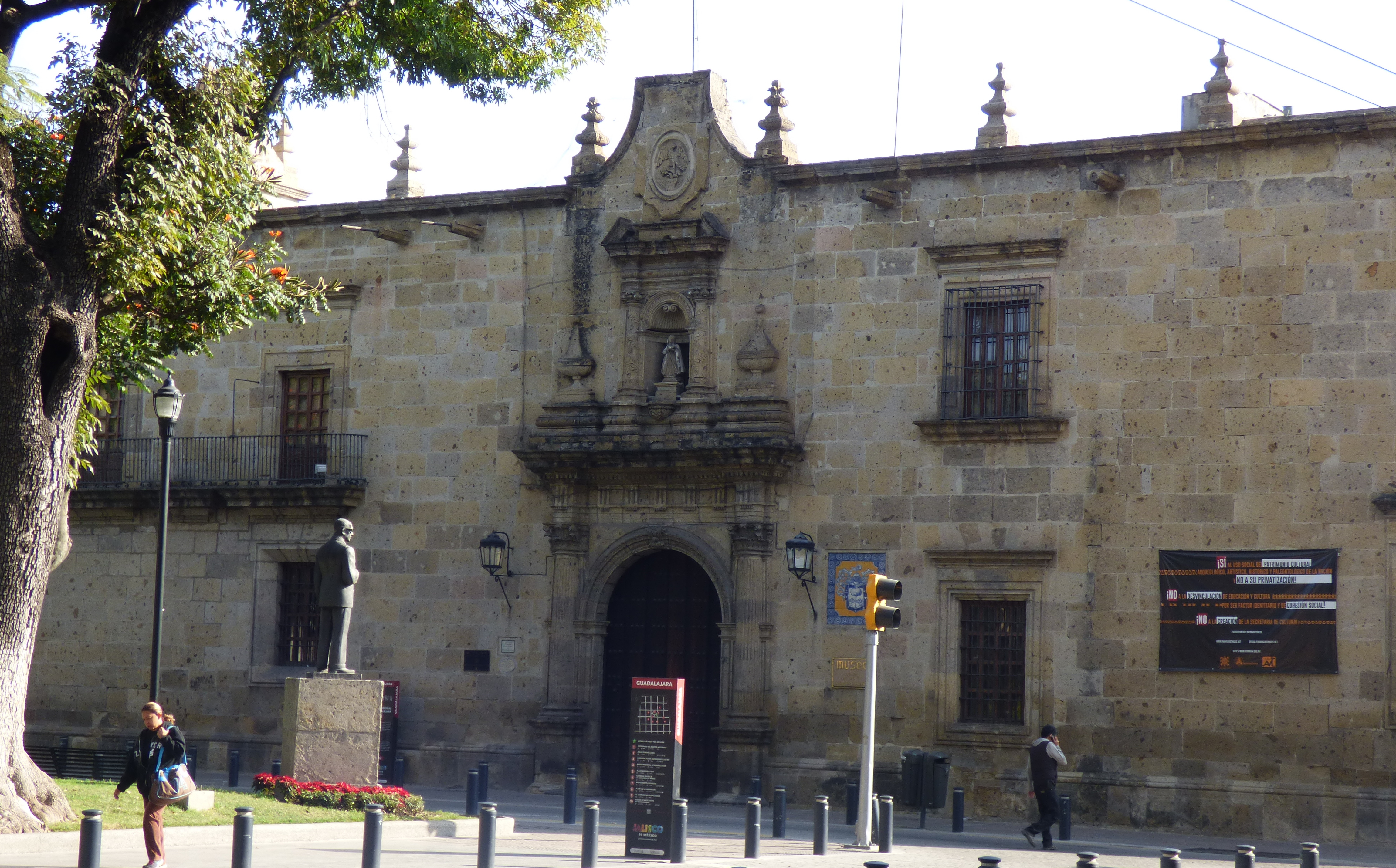 Fachada del Museo Regional de Guadalajara, Jal., Méx.